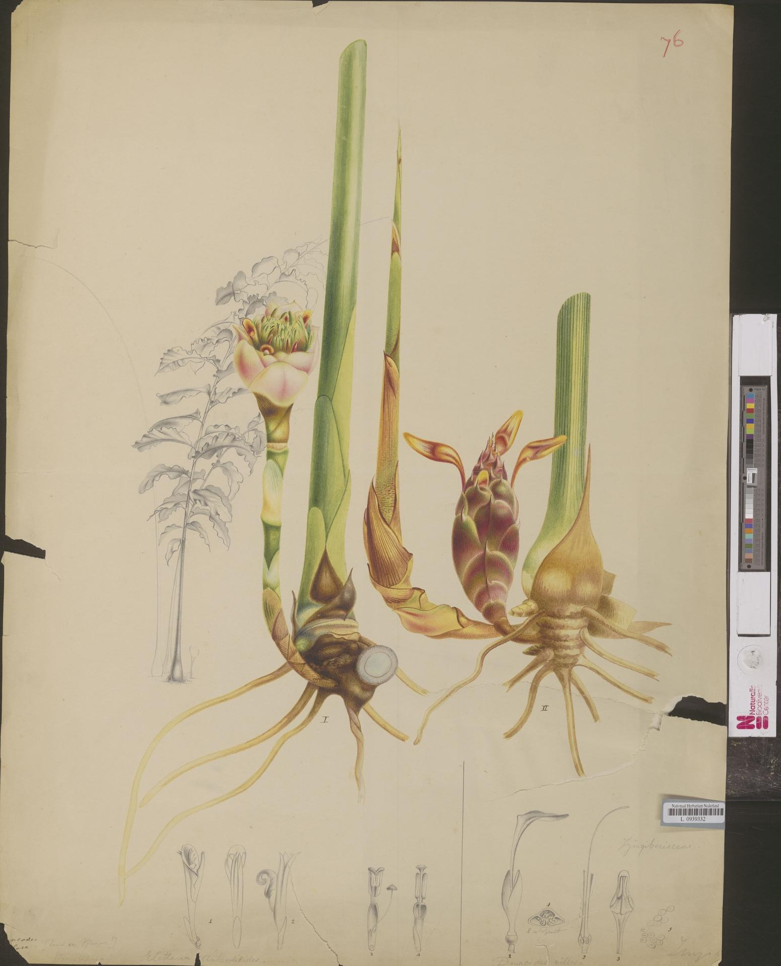 Elettaria anthodioides